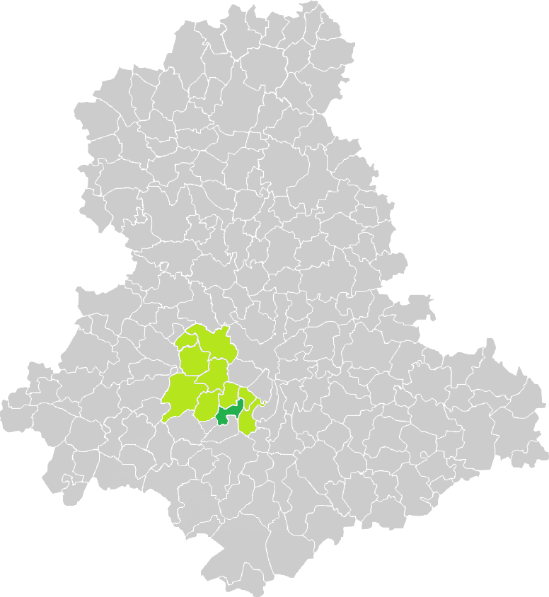 Carte de situation de la commune de Burgnac (en vert foncé) dans le votre Canton (en vert clair) sur une carte des communes de la Haute-Vienne